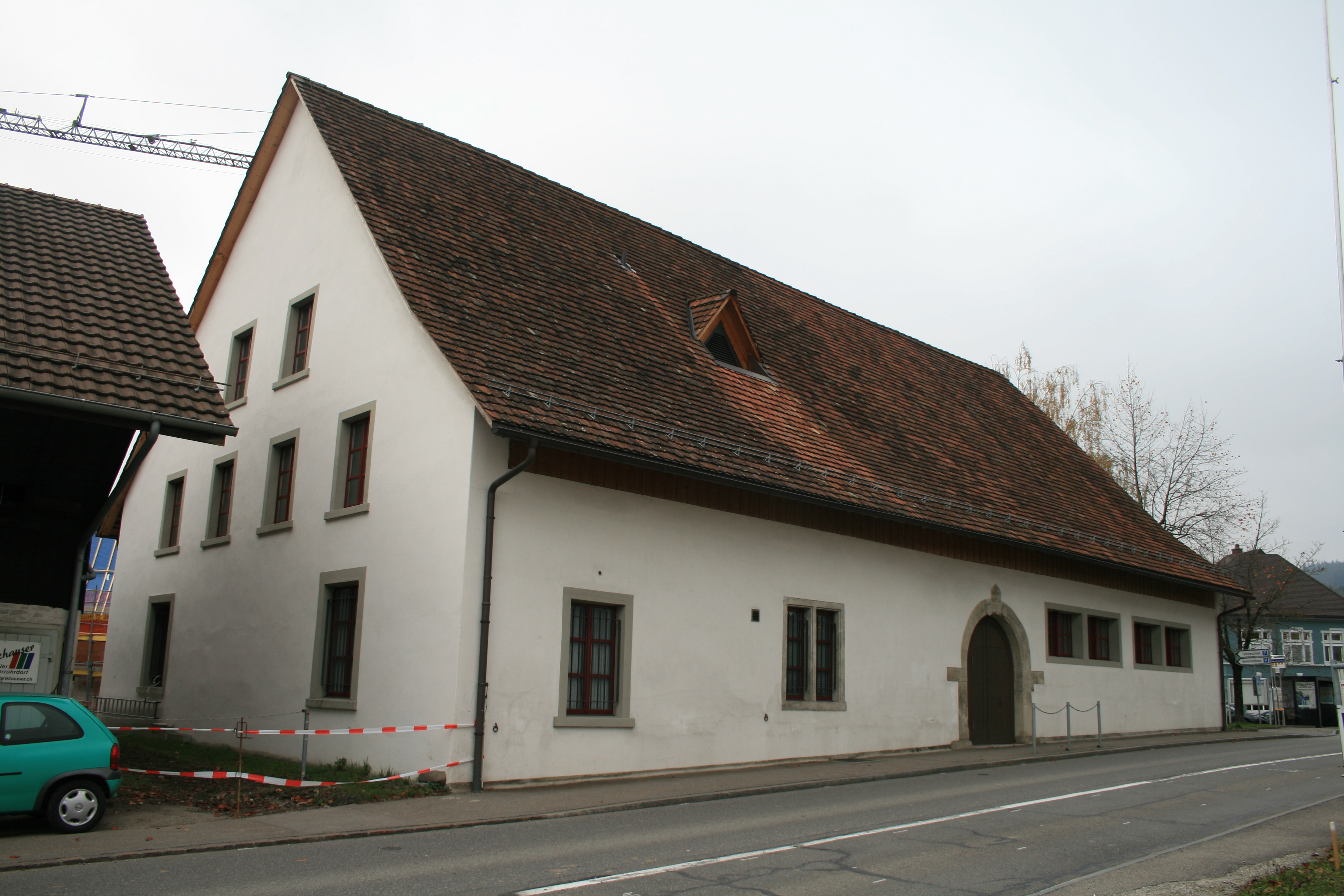 Zähnteschüür, Oberrohrdorf